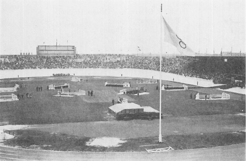 Parcours de saut d'obstacles aux jeux olympiques d'Amsterdam en 1928.